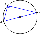 Propriété géométrique du cercle : un triangle inscrit dont deux points sont sur un même diamètre forme un triangle rectangle au troisième point.